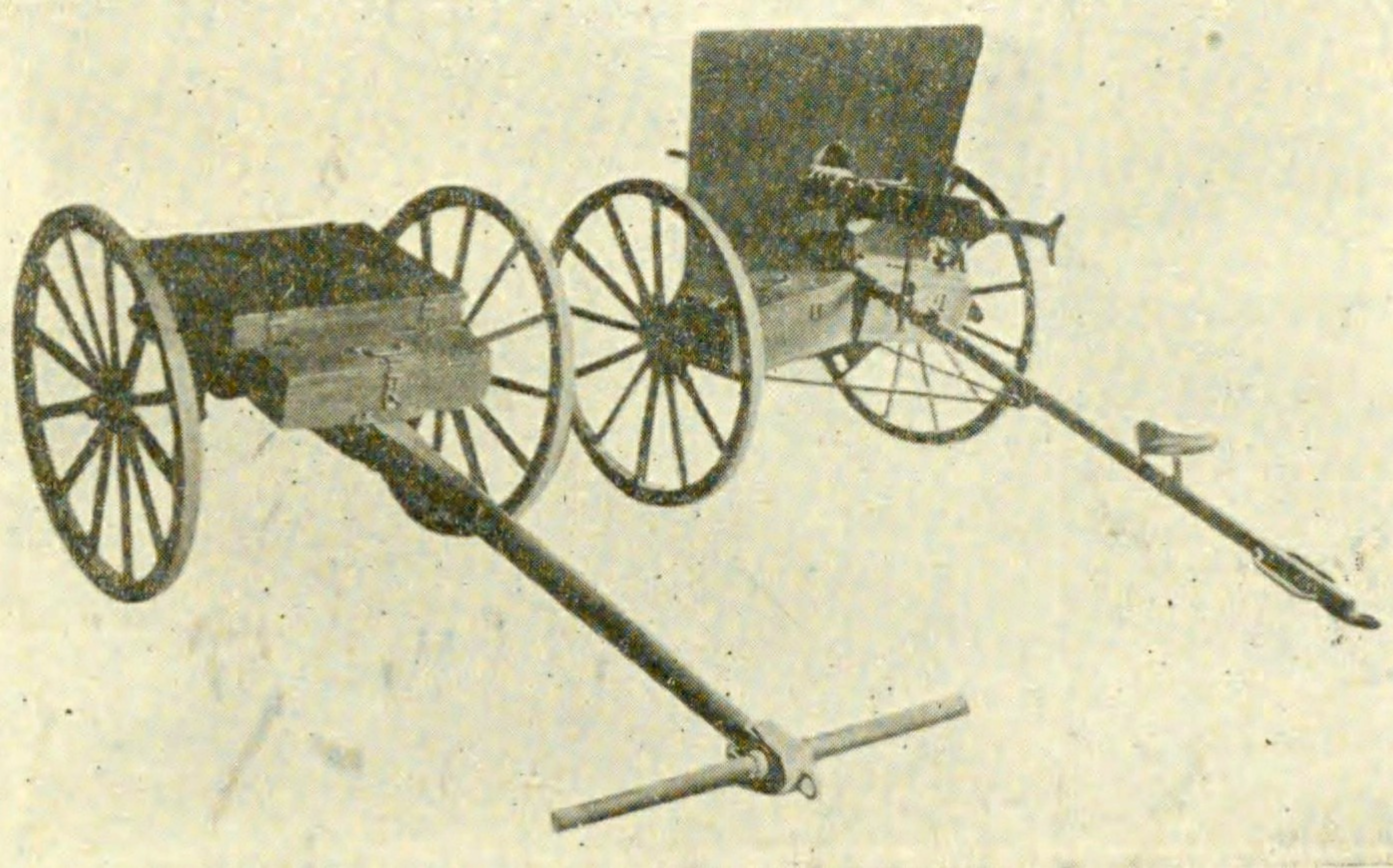 装輪式の保式機関砲。